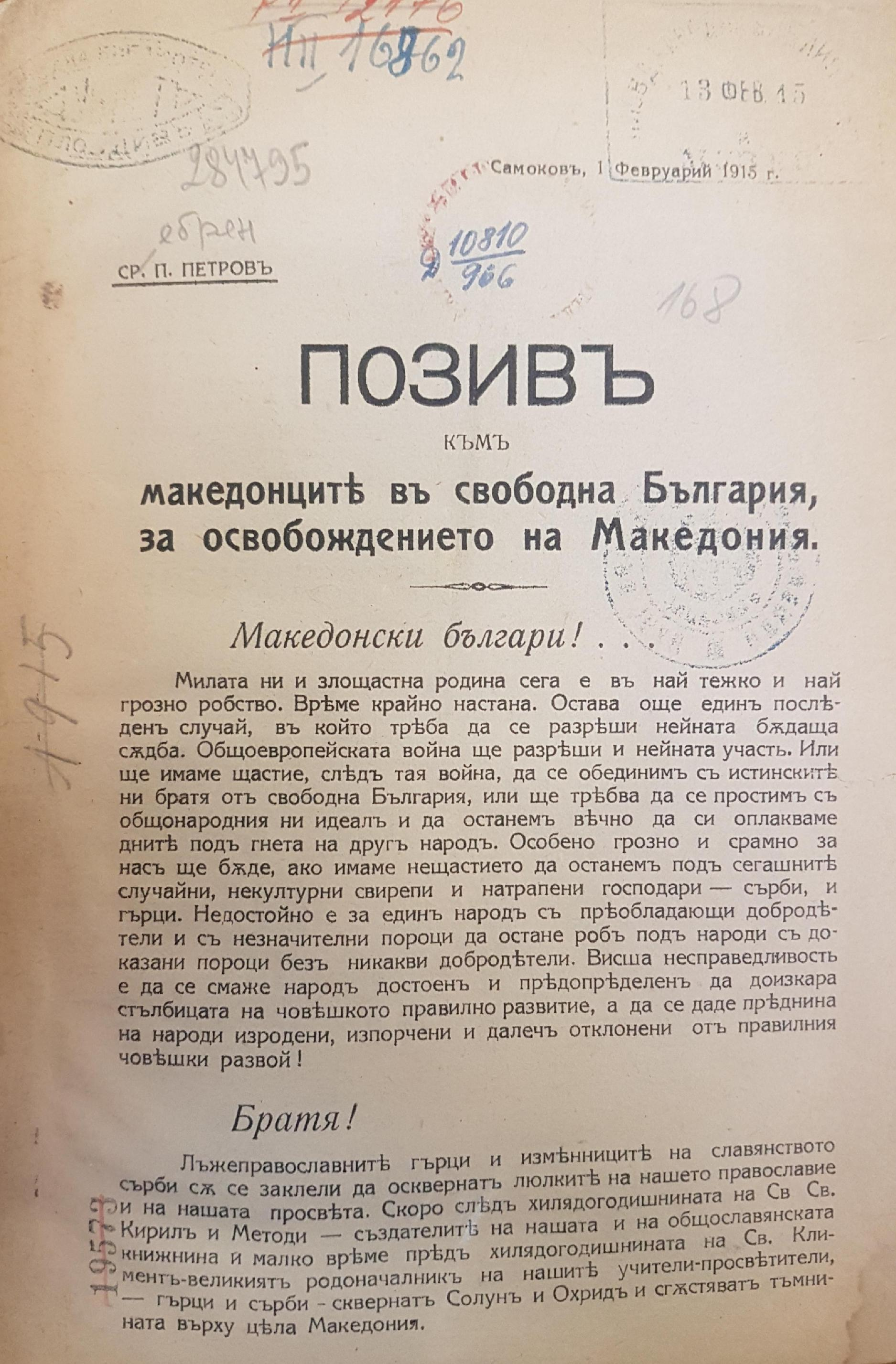 Позив към македонците в свободна България за освобождението на Македония